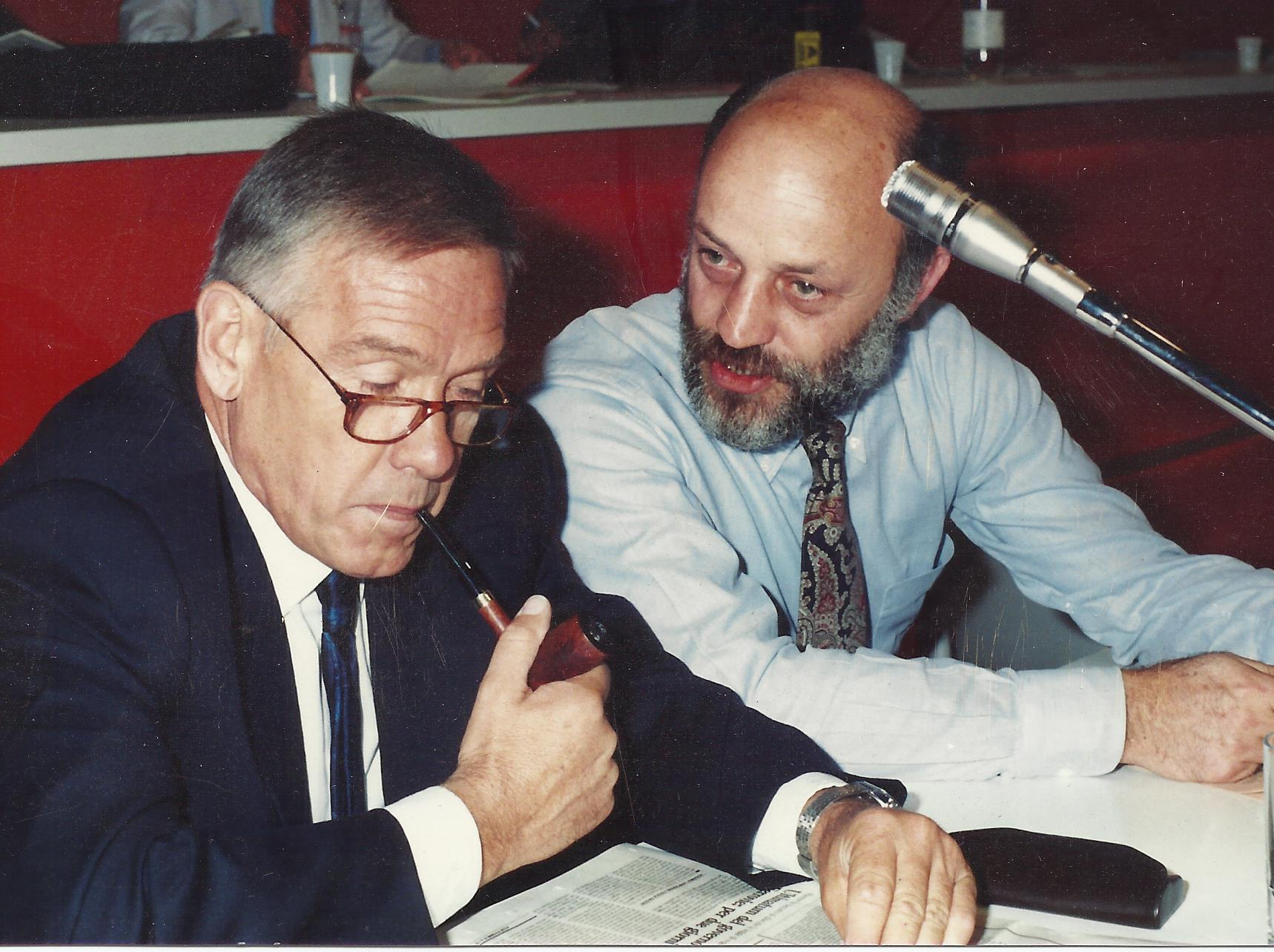 Airoldi and Trentin at a Cgil congress